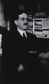 Fotografia del chimico e biologo statunitense